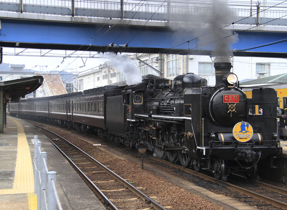 SLやまぐち号 C57 1 けん引